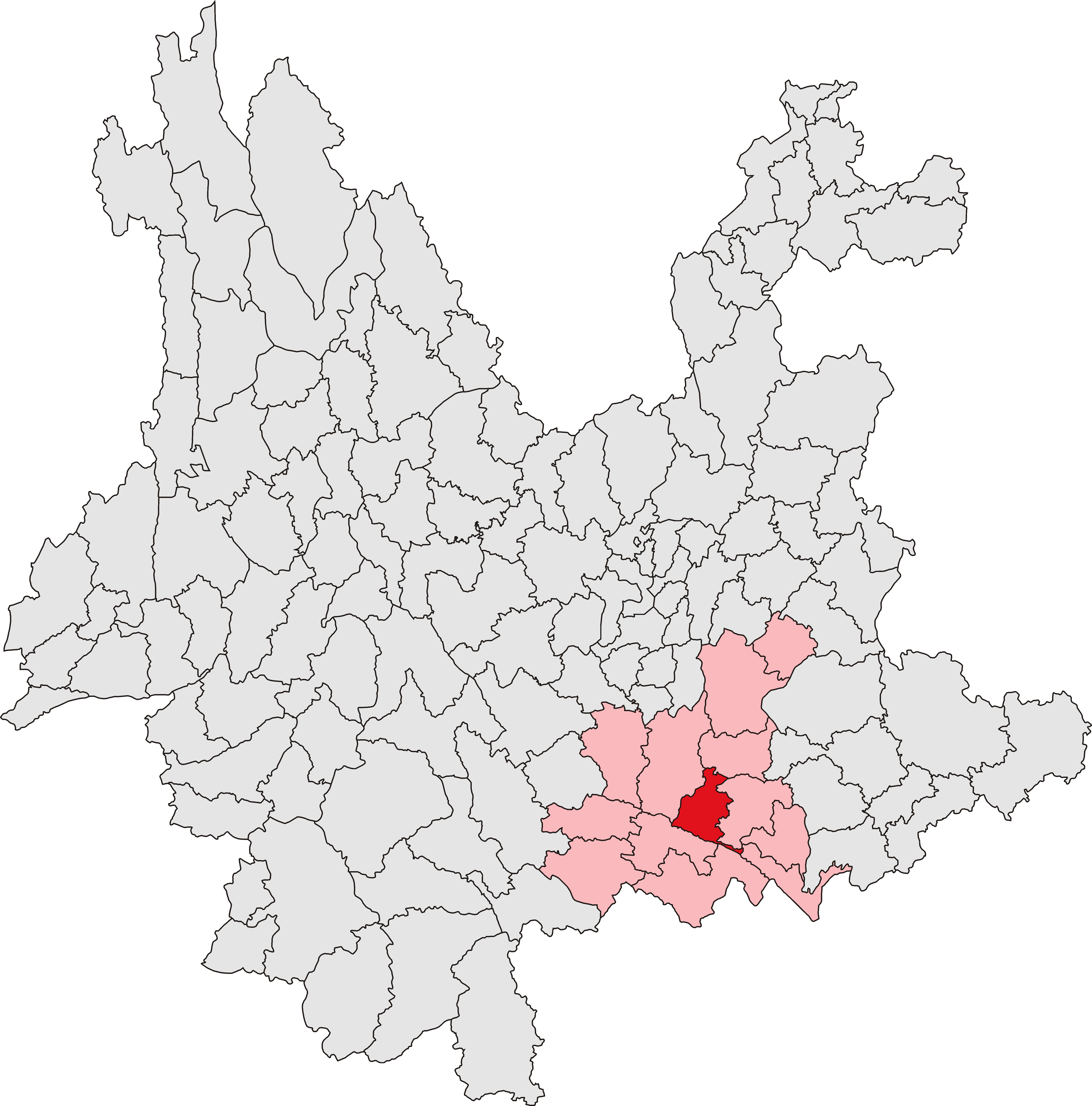 个旧市位置图